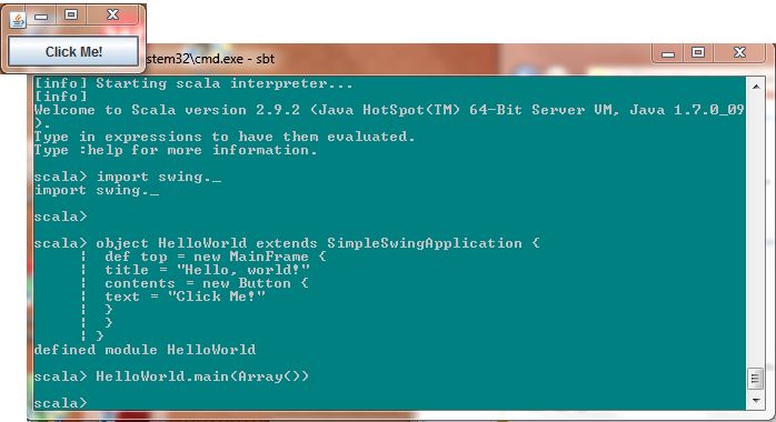 Een voorbeeld van een HelloWorld programma in Scala.